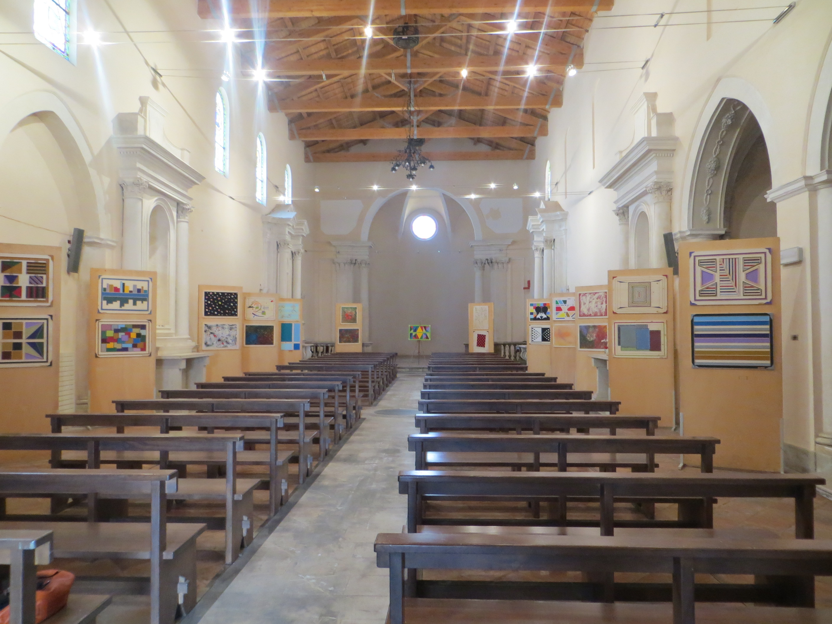 Interno della Chiesa di Sant'Agostino ad Atri